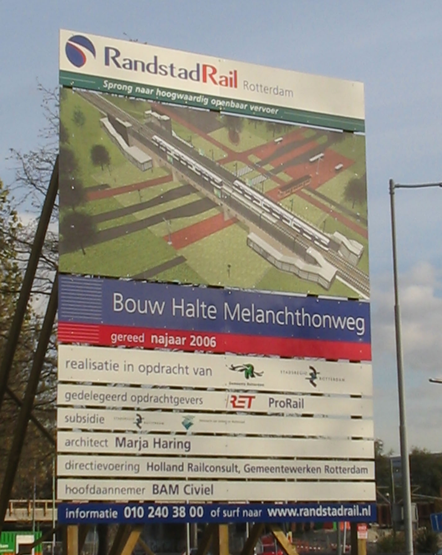 bouw halte Melanchthonweg, Rotterdam